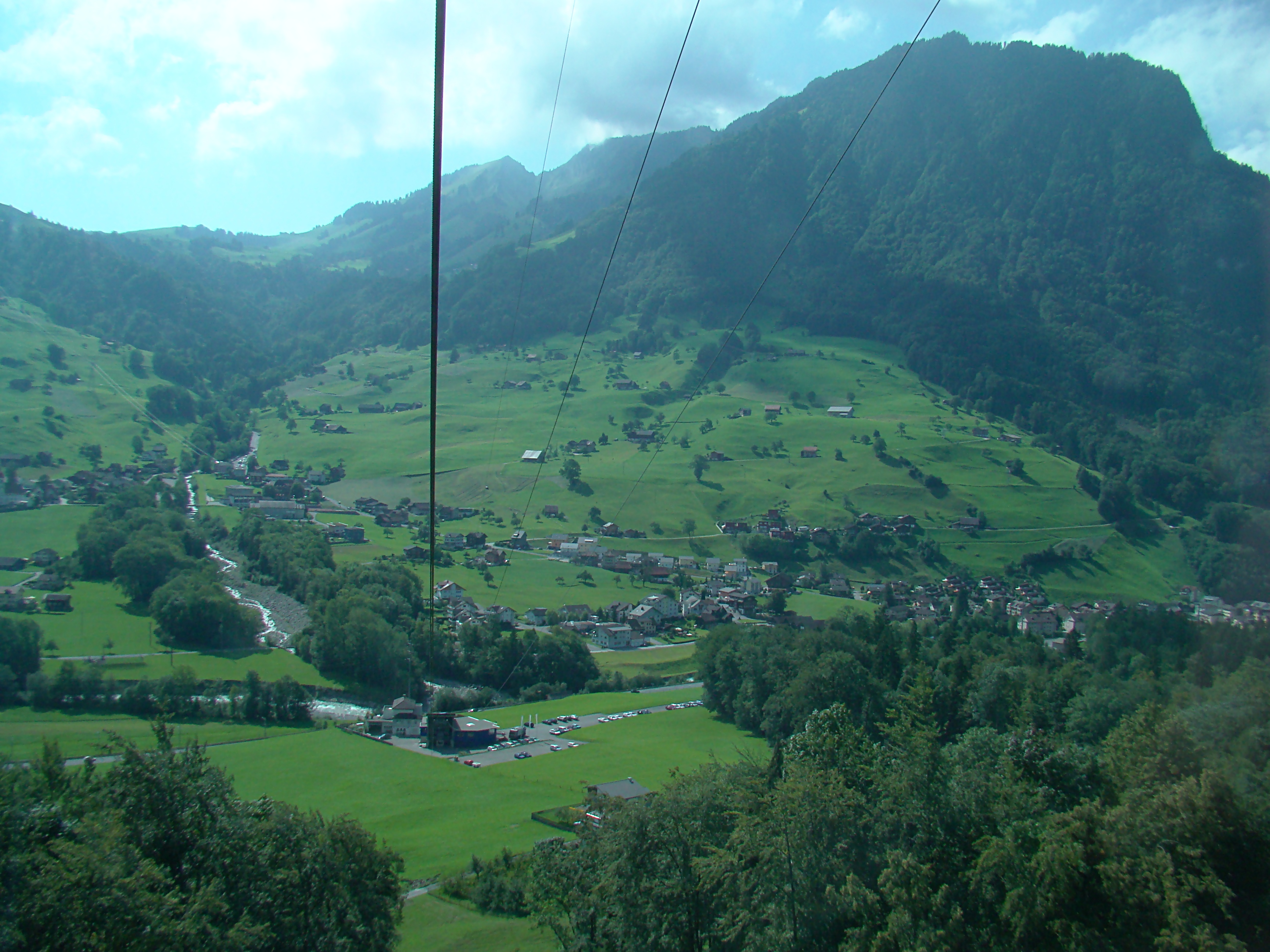 View of Dallenwil from the cable cabin to Niederrickenbach. Above the Stanserhorn and the Aecherlipass. Dallenwil, von der Seilbahn nach Niederrickenbach aus gesehen. Oben das Stanserhorn und der Aecherlipass. fotographed by Mussklprozz on August 12, 2009